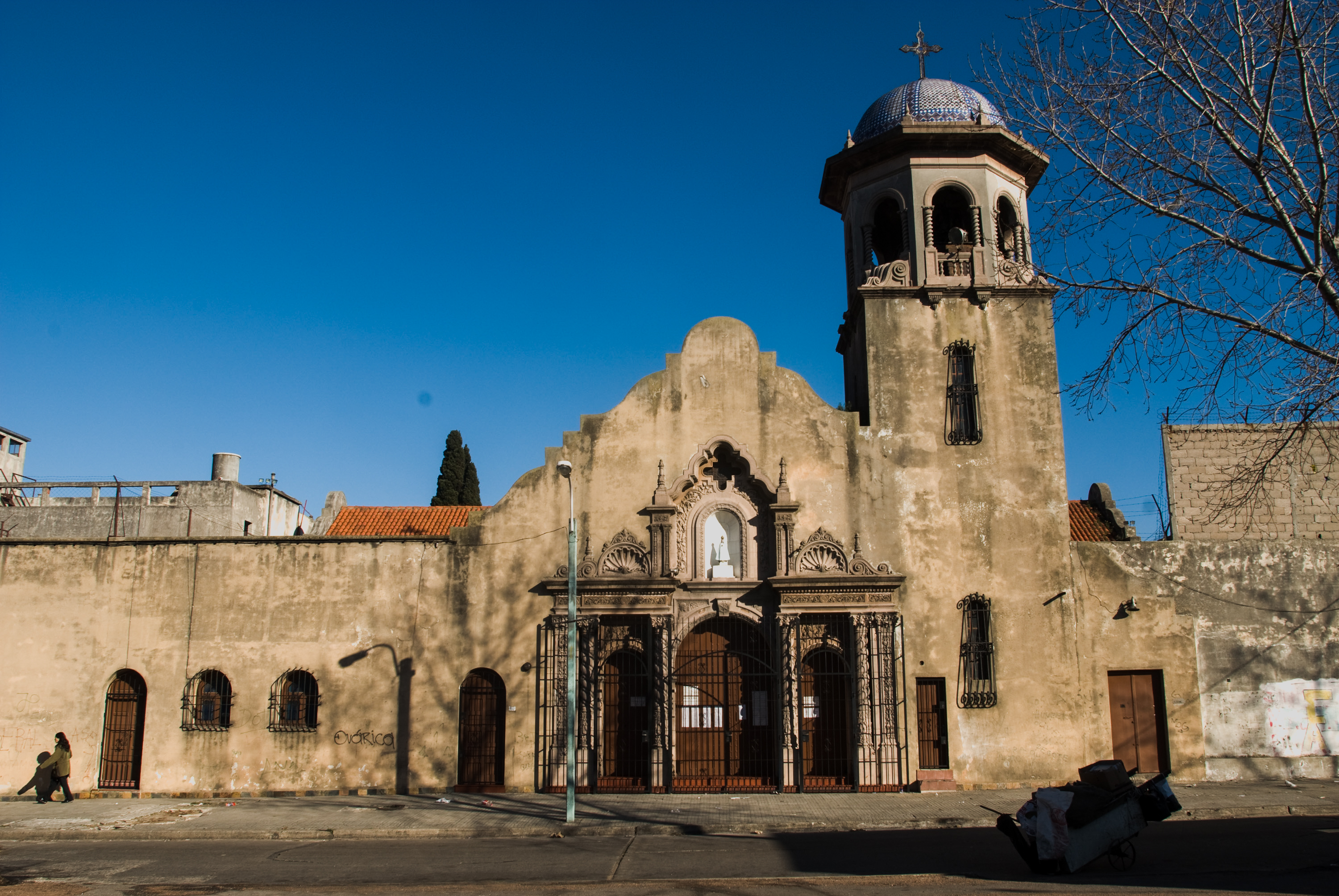 Fotografía de centro de detención durante la dictadura cívico militar en Uruguay tomada por Carlos Contrera y parte de la muestra Huellas de la Represión : Identificación de centros de detención del autoritarismo y la dictadura (1968-1985). Licenciado libremente por el Centro de Fotografía de Montevideo en el marco de la Editatón Wiki DDHH Uruguay 2018. y la colaboración GLAM de esa institución con Wikimedia Uruguay. Asunto Especifico:Temas relacionados: Huellas de la represionCodigo de referencia: UY858Numero de registro: FMCMRTECDTitulo del Fondo: Fondo Municipal ContemporaneoTitulo de Subfondo: Memoria de la Represion y del Terrorismo de EstadoTitulo de Serie: Centros de detencionFecha de registro:Nombre del o de los productores: Centro Municipal de FotografiaNombre del o de los autores: CONTRERA ORGAMBIDE Carlos MariaTipo general y especifico de documento: fotografia, positivoModalidad de ingreso: fotografia producida por un fotografo del CMDFTecnica Fotografica: fotografia digitalSoporte: magneto-opticoFormato: 3872 x 2592 pixeles a 8 bits por canal en espacio de color Adobe RGB (1998)Tipo de archivo: tiff sin compresionTipo de imagen: Horizontal, VerticalTono: policromoTradicion documental: originalSignatura Topografica: Modulo 5Existencia:Maquina: Nikon D200Lente: Nikkor ED 20-35 mm f 2.8, Nikkor ED 80-200 mm f 2.8, Nikkor ED 35-70 f 2.8Estructura formal:Fecha de ingreso:Documento relacionado: Notas complementarias:Condiciones de acceso: libre para la consultaCondiciones de reproduccion: restringido